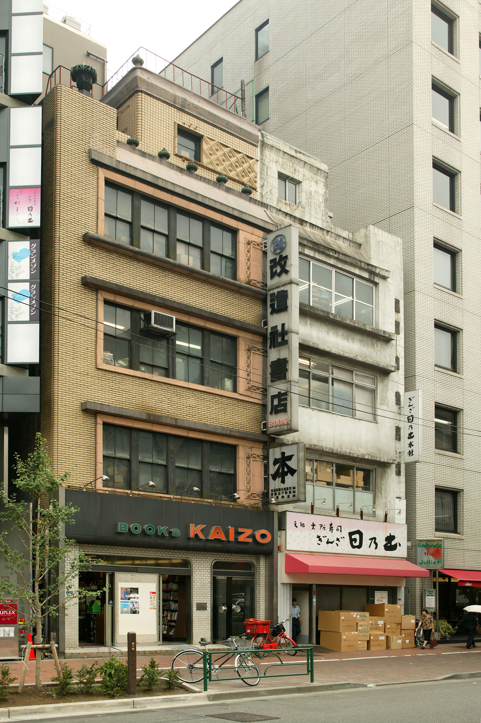 Kaizo-sya building, Ginza, Chūō-ku, Tokyo, Japan.